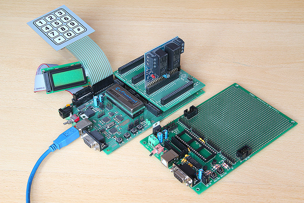 C-Control der letzten Generation mit Schaltrelais-Erweiterung. Daneben das Entwickler-Board.